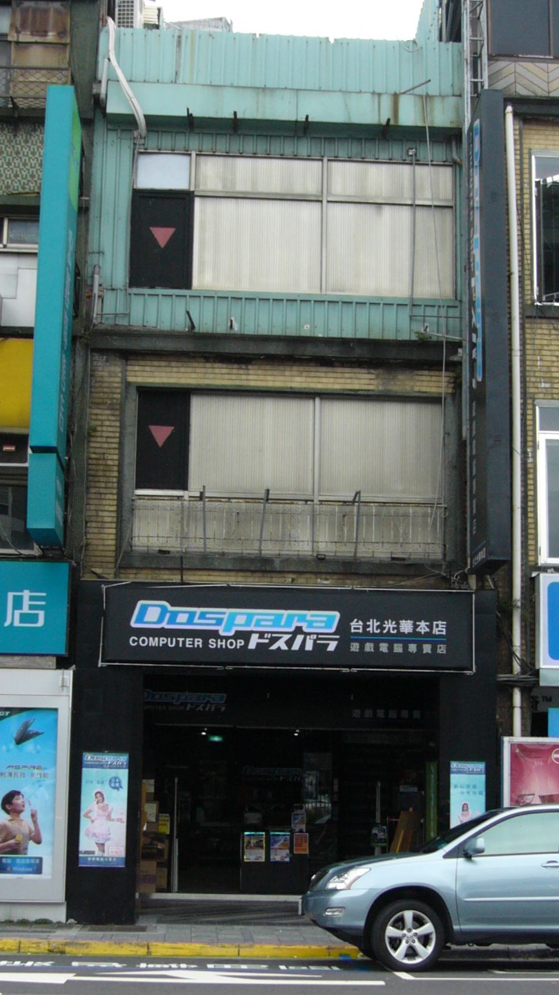 Dospara遊戲電腦專賣店台北光華本店，位於臺北市中正區八德路一段90號，2011年11月結束營業。